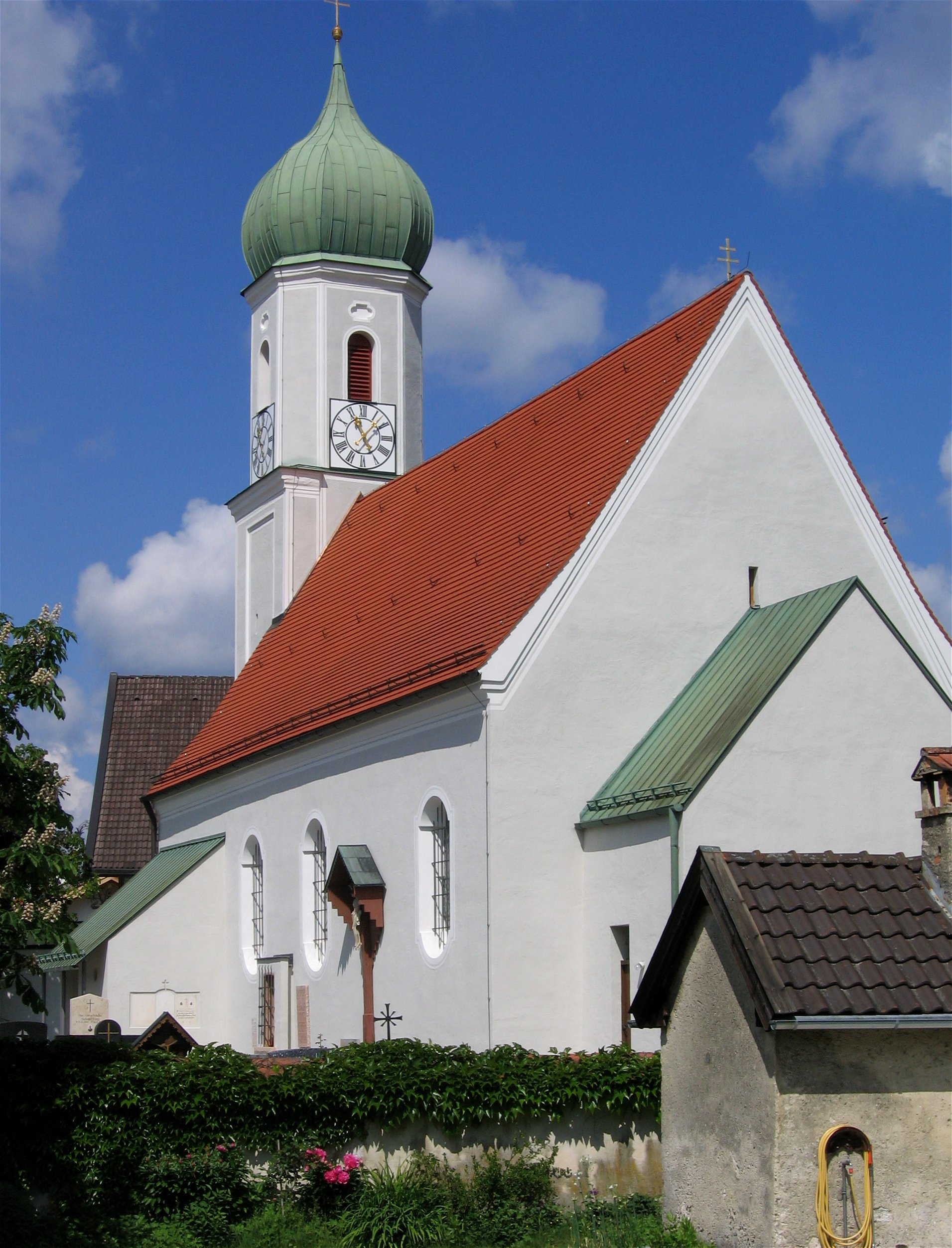 Hauptstraße 13; Kath. Pfarrkirche St. Martin; im Kern spätgotisch, Ende 17. Jh. barockisiert; mit Ausstattung. Egling